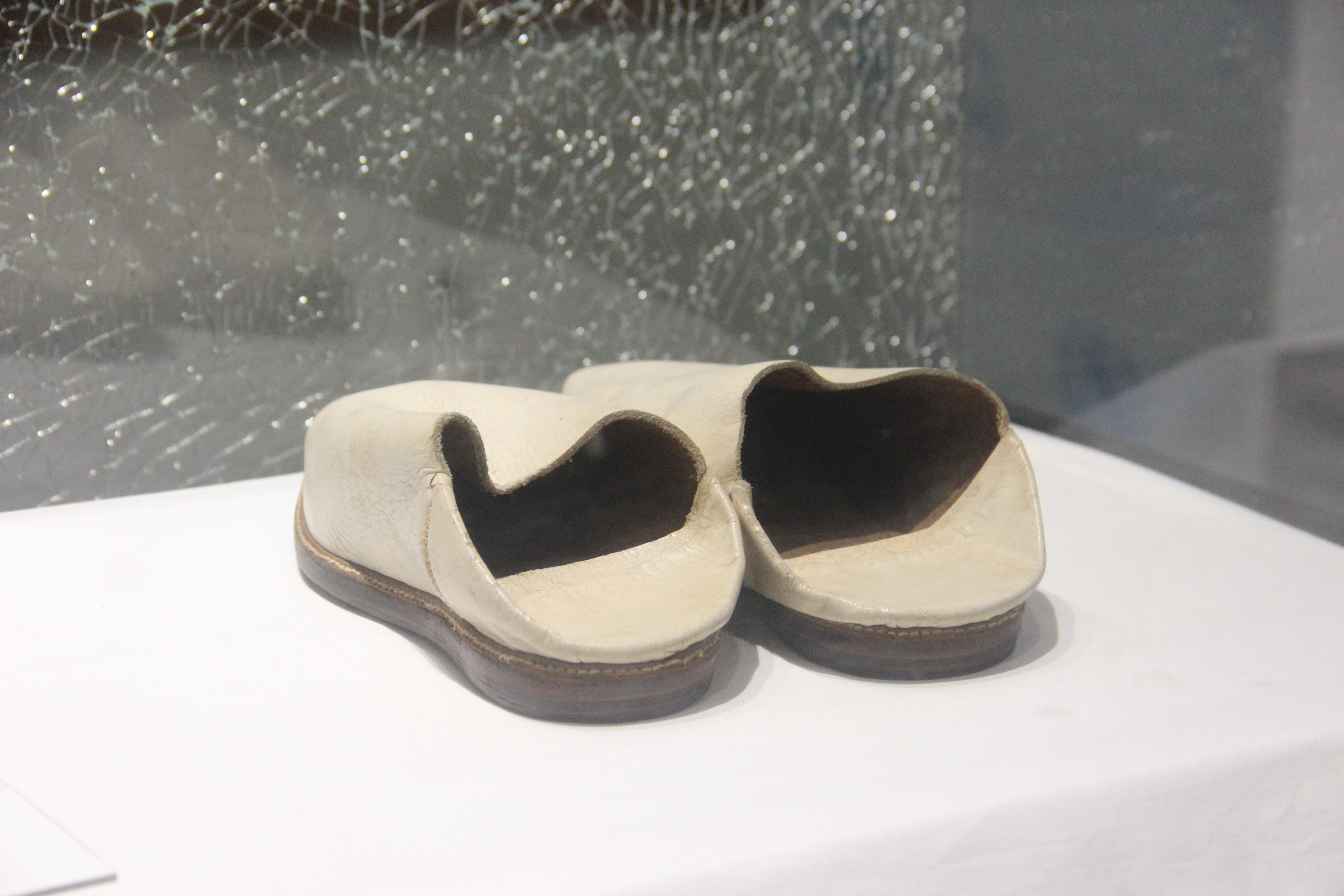 Babouches de Serigne Babacar Sy, exposées au Musée des Civilisations Noires de Dakar (Sénégal). This is an image with the theme "Africa on the Move or Transport" from: Senegal